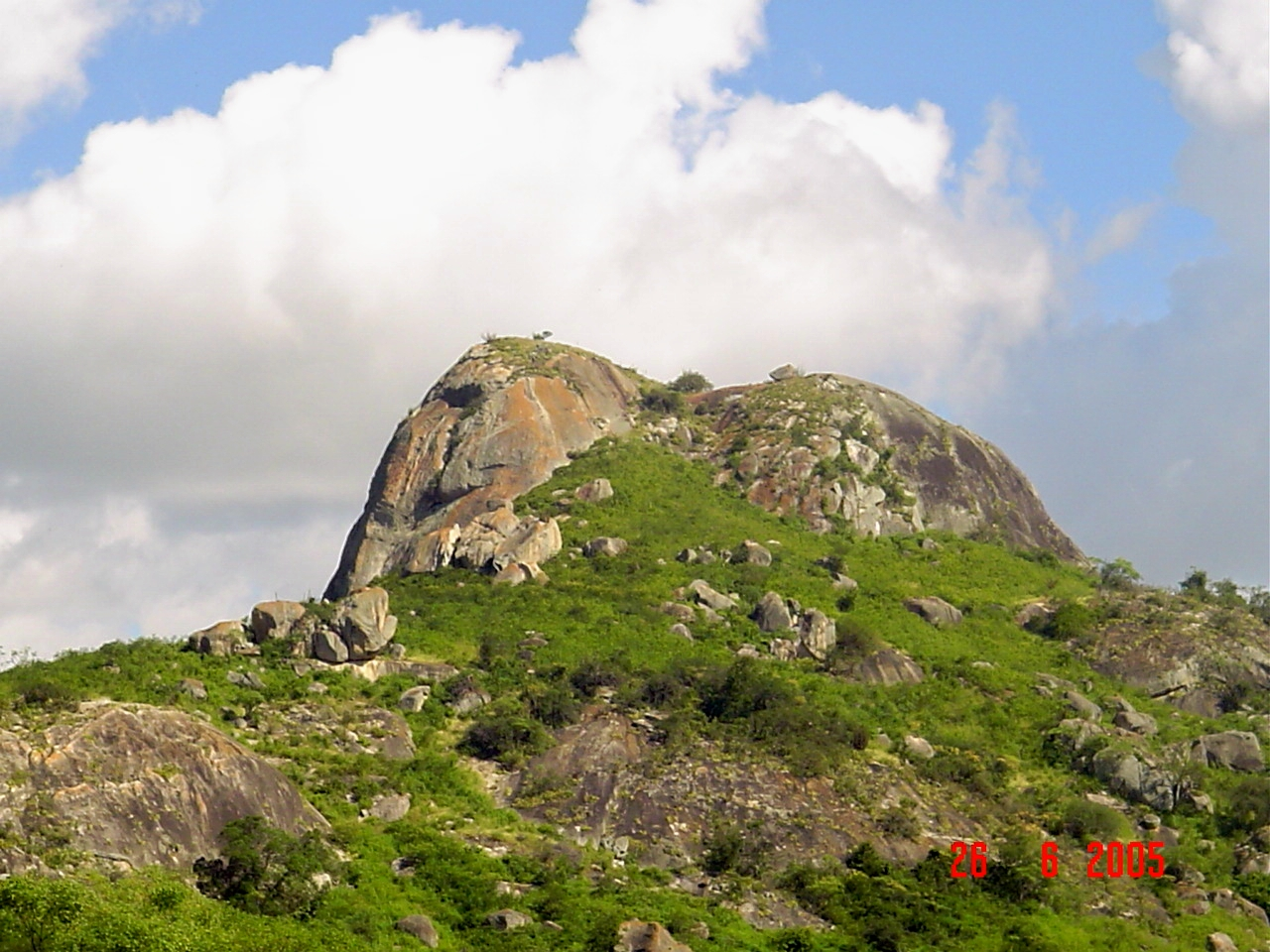 PEDRA DA BOCA NEGRA - DISTRITO DE BAIXA GRANDE, TORRÃO NATAL